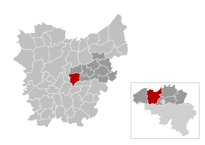 Gemeentekaart, eigen werk Categorie:Kaart met locatie Belgische gemeente